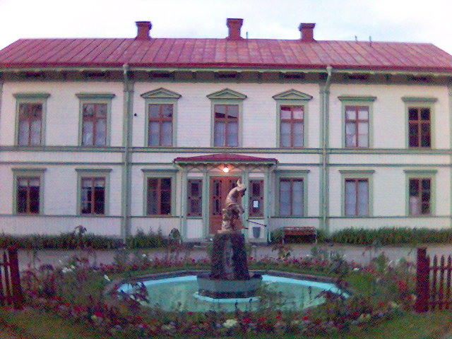 Stenegård i Järvsjö, Hälsingland.